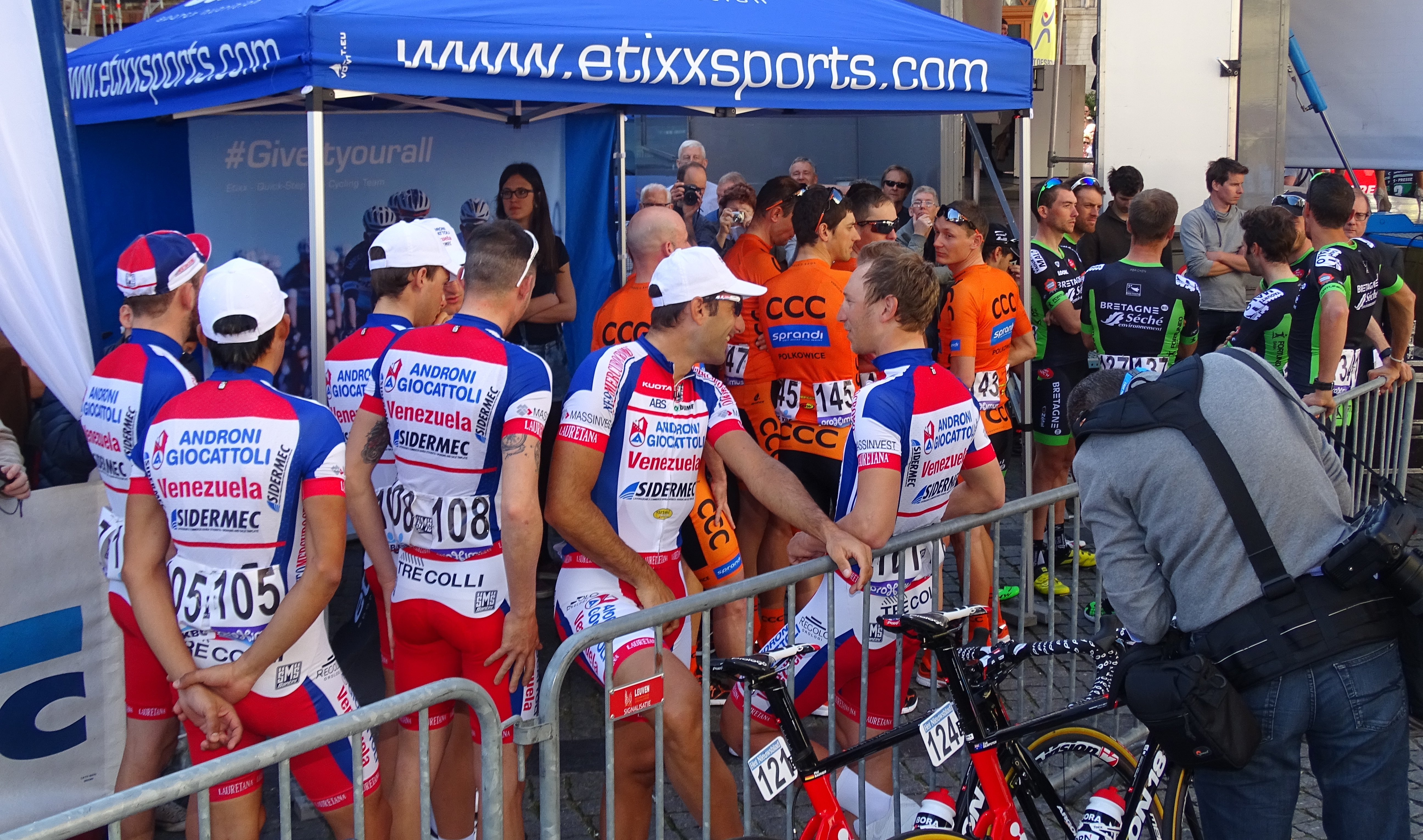 Reportage réalisé le mercredi 15 avril à l'occasion du départ de la Flèche brabançonne 2015 à Louvain, Belgique.